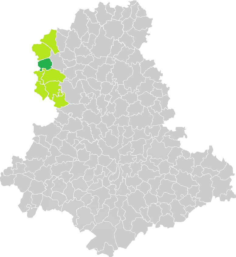 Carte de situation de la commune de Saint-Martial-sur-Isop (en vert foncé) dans le votre Canton (en vert clair) sur une carte des communes de la Haute-Vienne